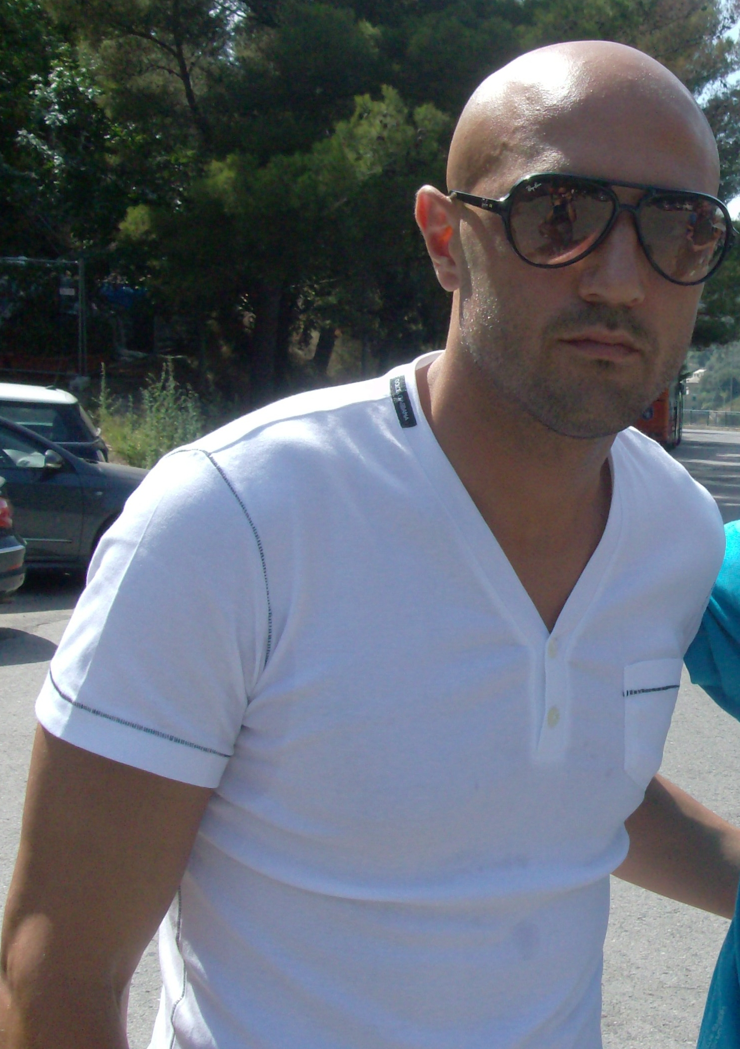 Massimo Maccarone a Bogliasco